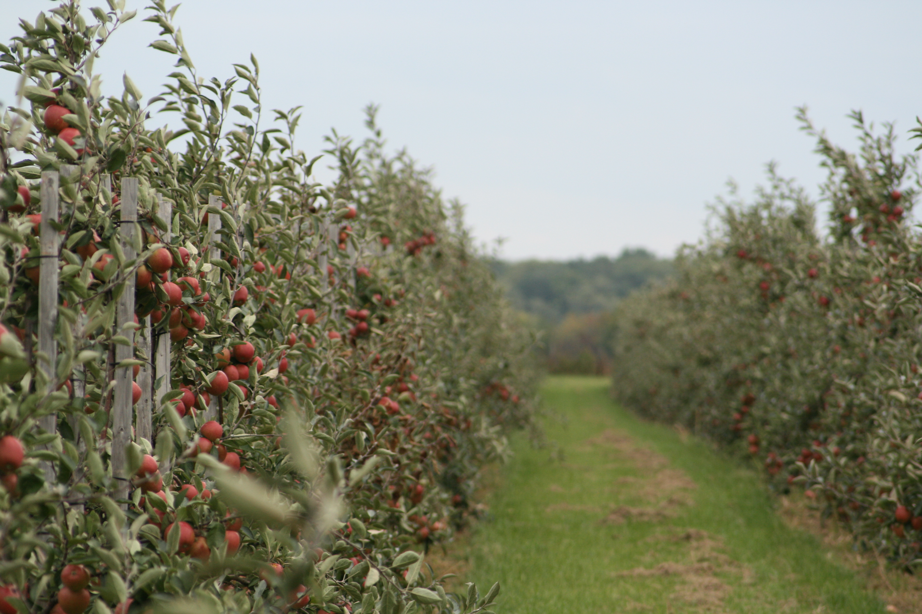 Apfel Anpflanzung (weit)